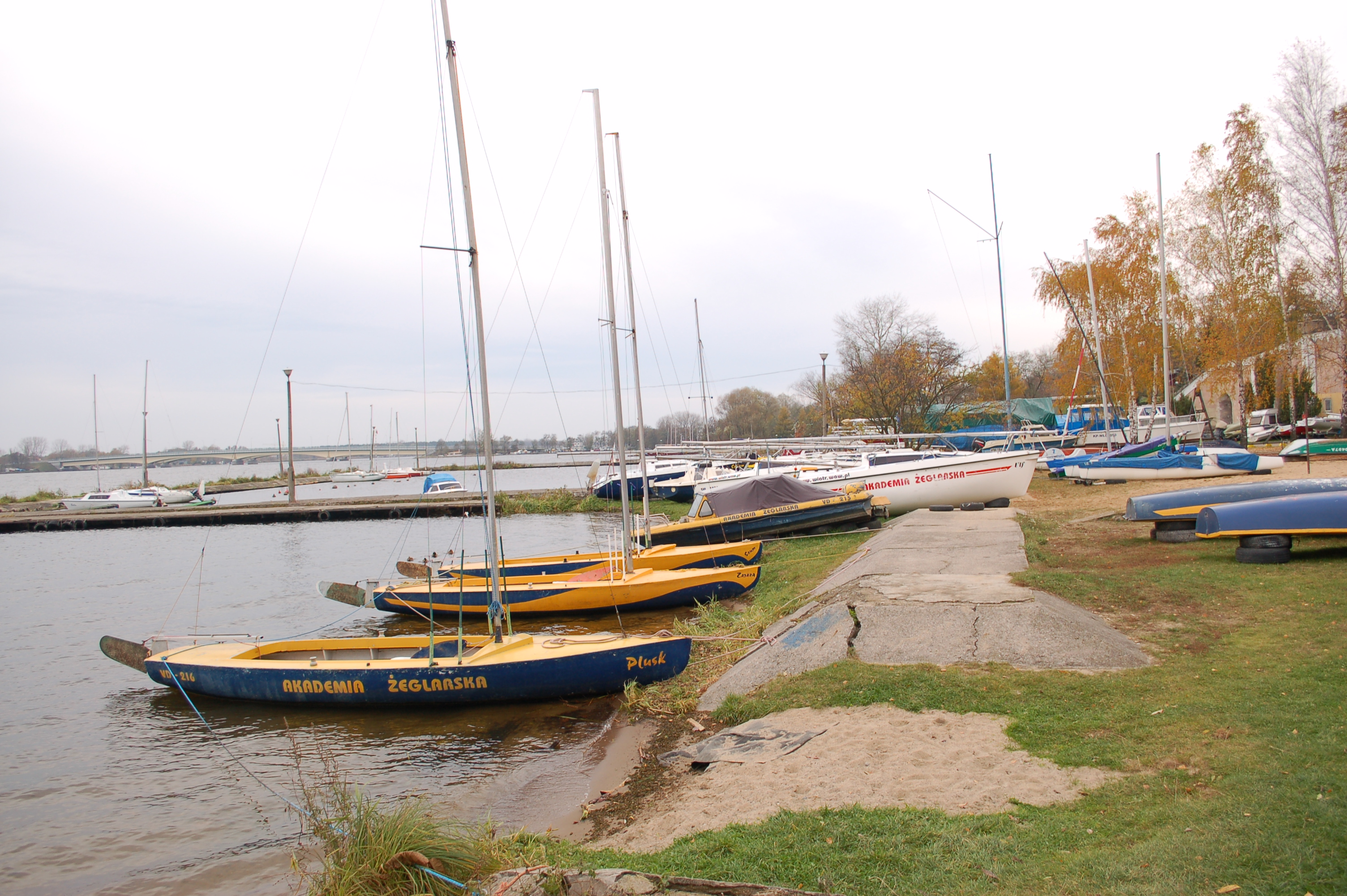 Zegrze lake